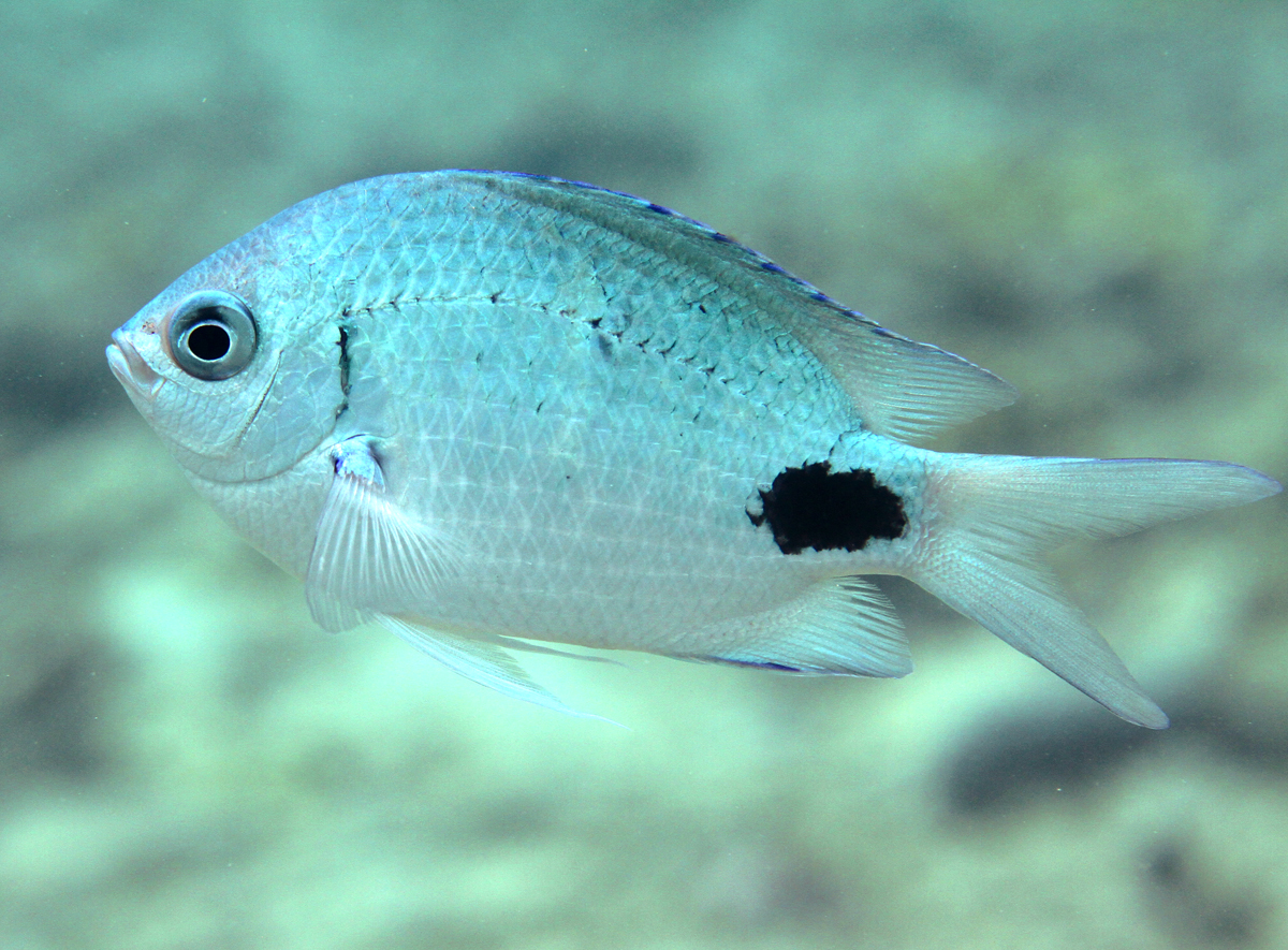 Un sergent-major à tache ovale (Abudefduf sparoides) à la Réunion.